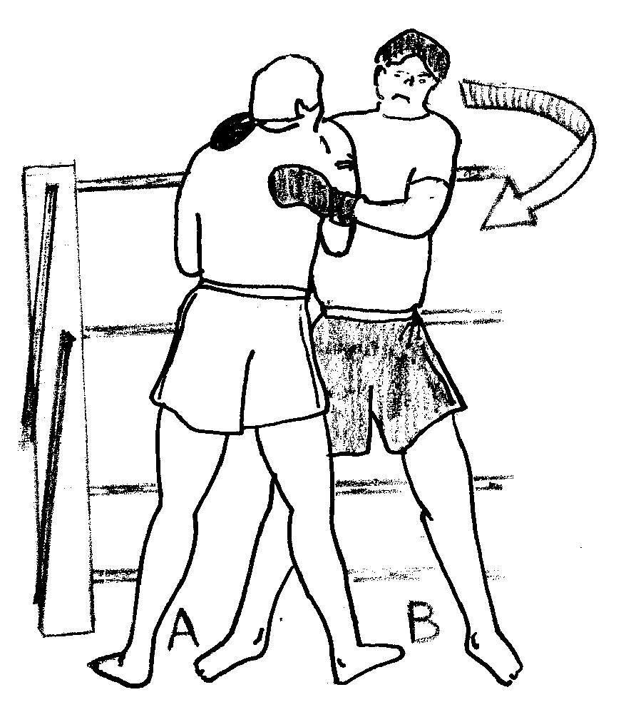 degagement1.jpg